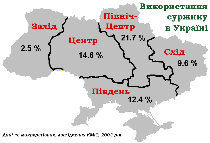 Вживання суржику у різних регіонах України (станом на 2003 р.)